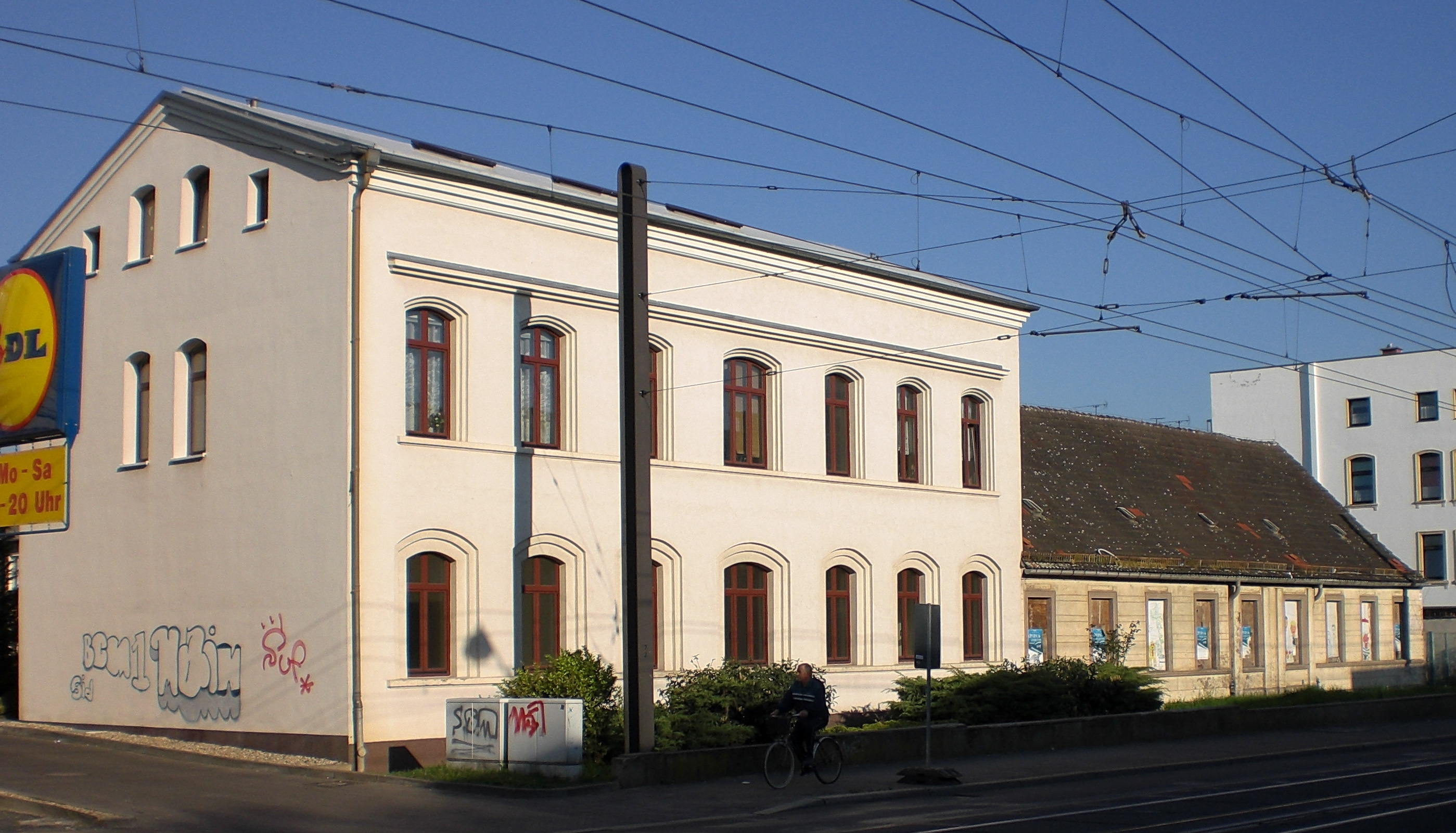 Alt Salbke 49 und 48, ehemalige Direktorenvilla von Fahlberg-List, nach Sanierung im Jahr 2008 von der Kanada-Bau GmbH Braunschweig abgerissen, um eine bessere Sichtbarkeit für einen dahinter geplanten Einkaufsmarkt zu erreichen.